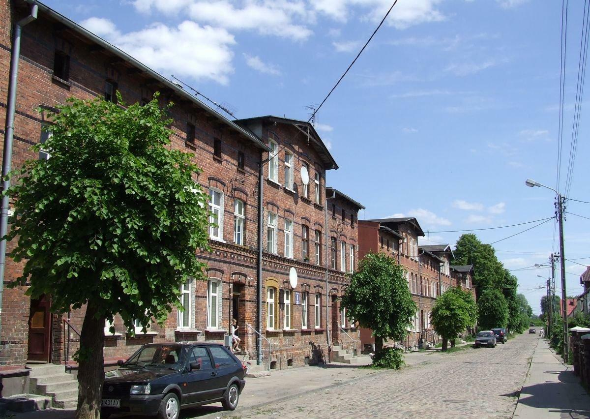 Ulica Głucha w Gdańsku Oruni Można by jeszcze dodać, stara Głucha w odróżnieniu od nowej wraz z osiedlem, położonej poza kadrem z prawej strony. Domy (od lewej) od nr 2 do 6